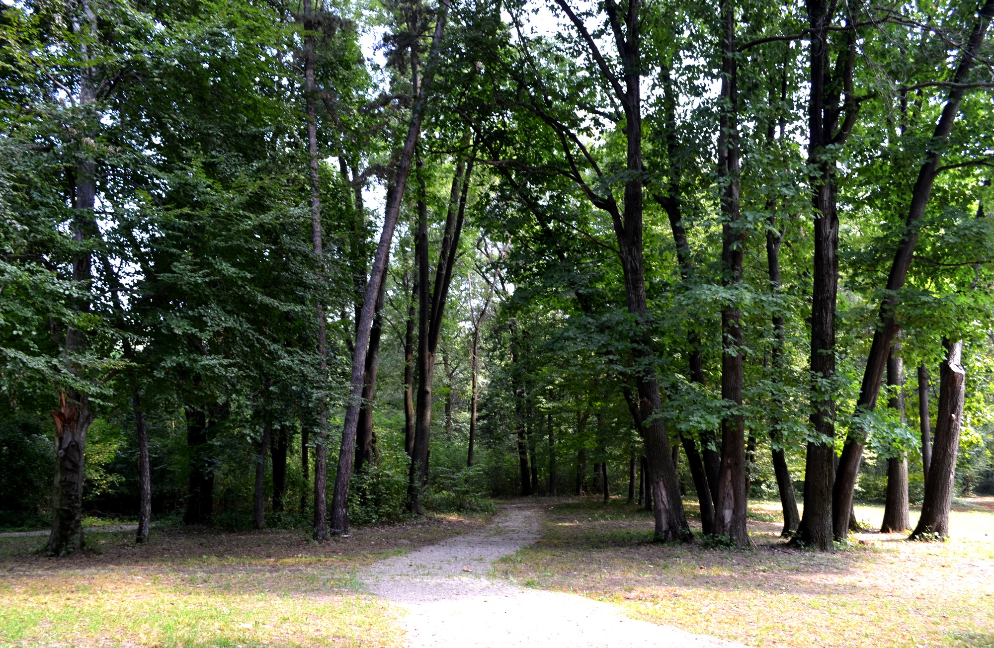 Dofteana Parc 02